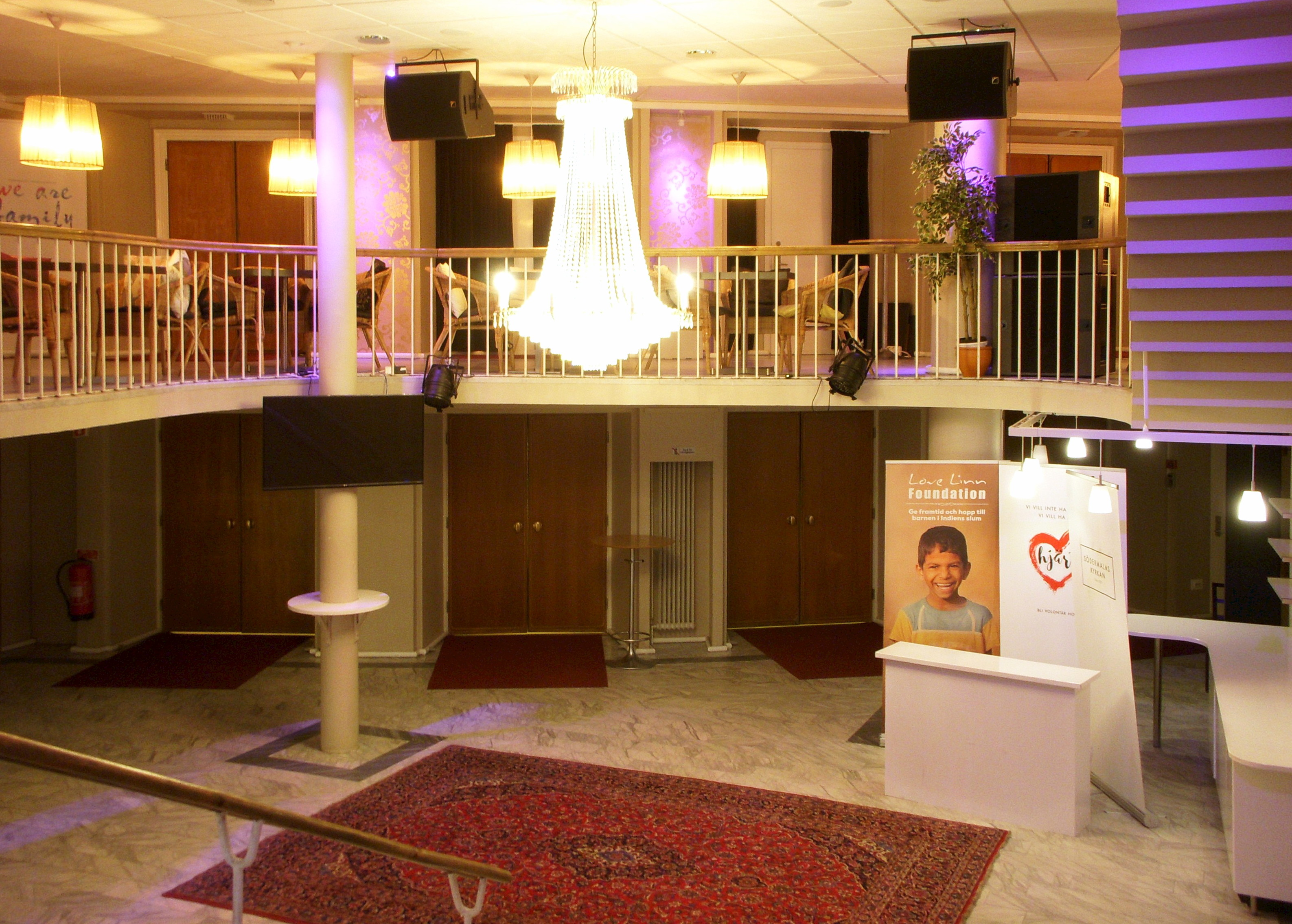 Södermalmskyrkan foajén